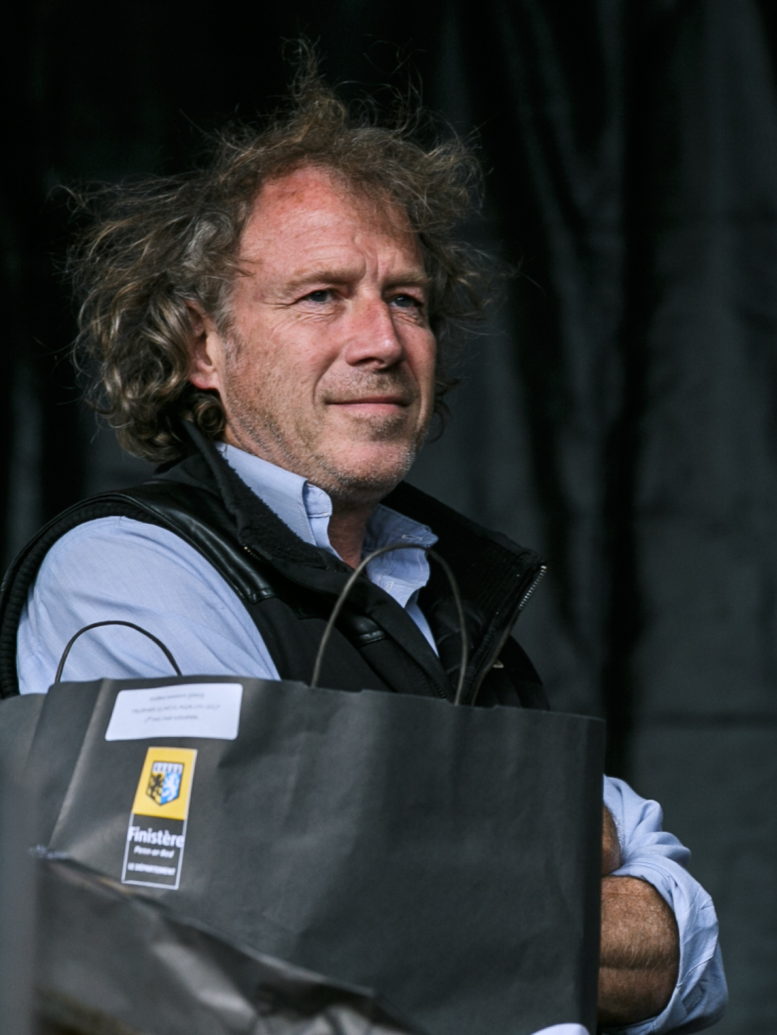 Annonce des résultats du trophée Hervé Le Meur en présence d'Alain Le Meur lors du Festival de Cornouaille à Quimper le 22 juillet 2017.